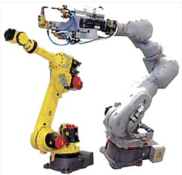 Exemple d'un robot que s'utilitza per a la soldadura per punts